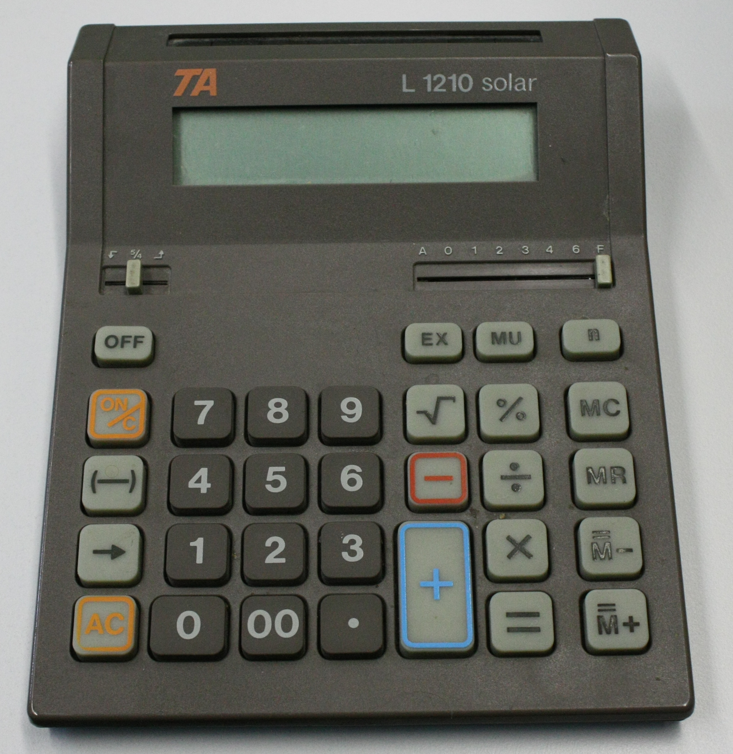 Tischrechner TA 1210 solar der Firma Triumph Adler